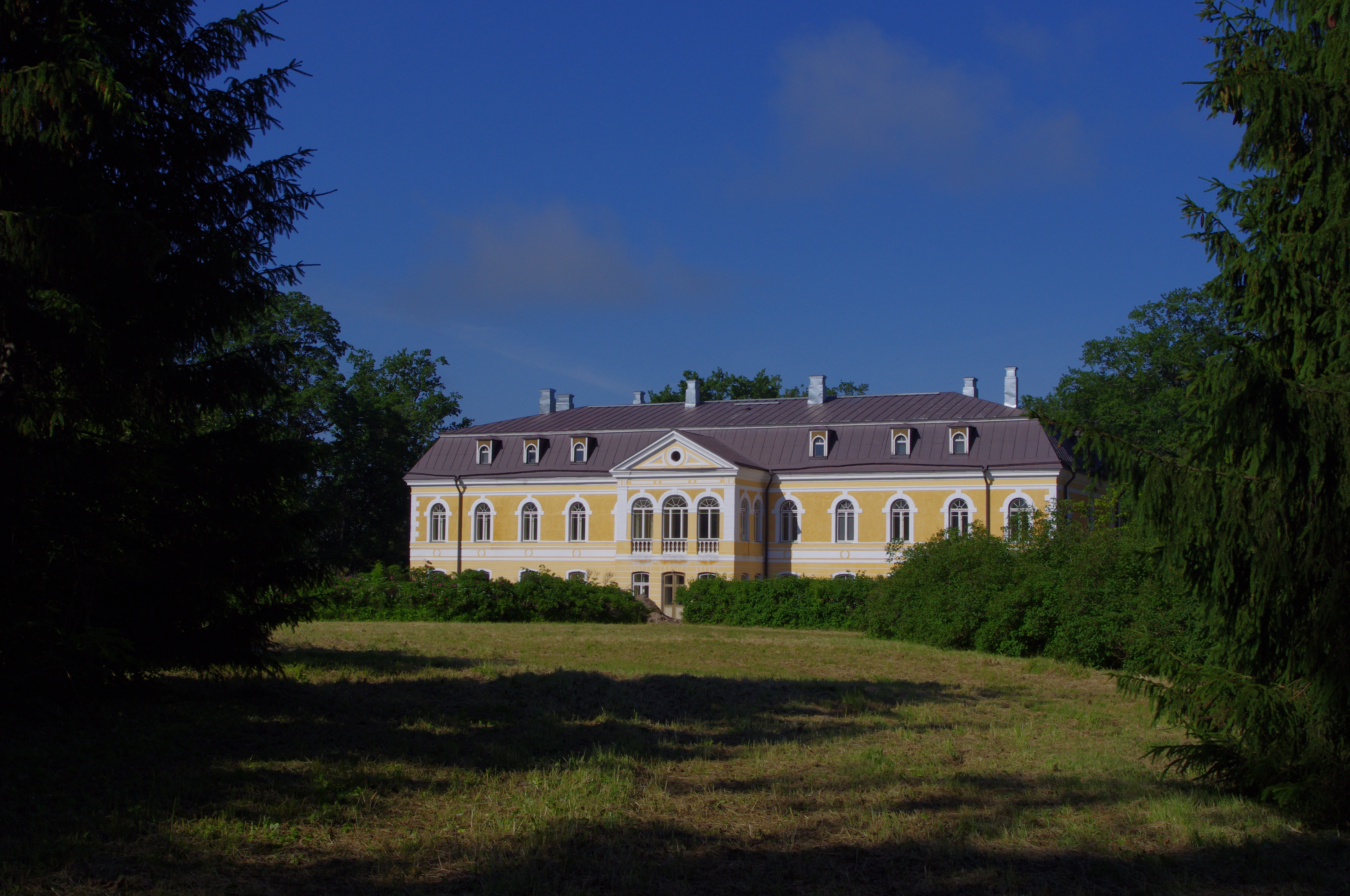 Kehtna rüütlimõisa peahoone